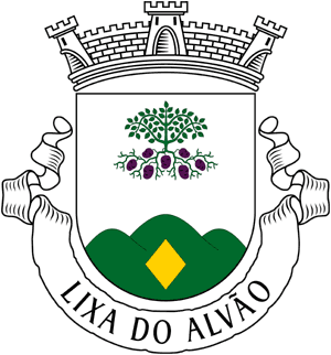 Brasão da freguesia de Lixa do Alvão (concelho de Vila Pouca de Aguiar)